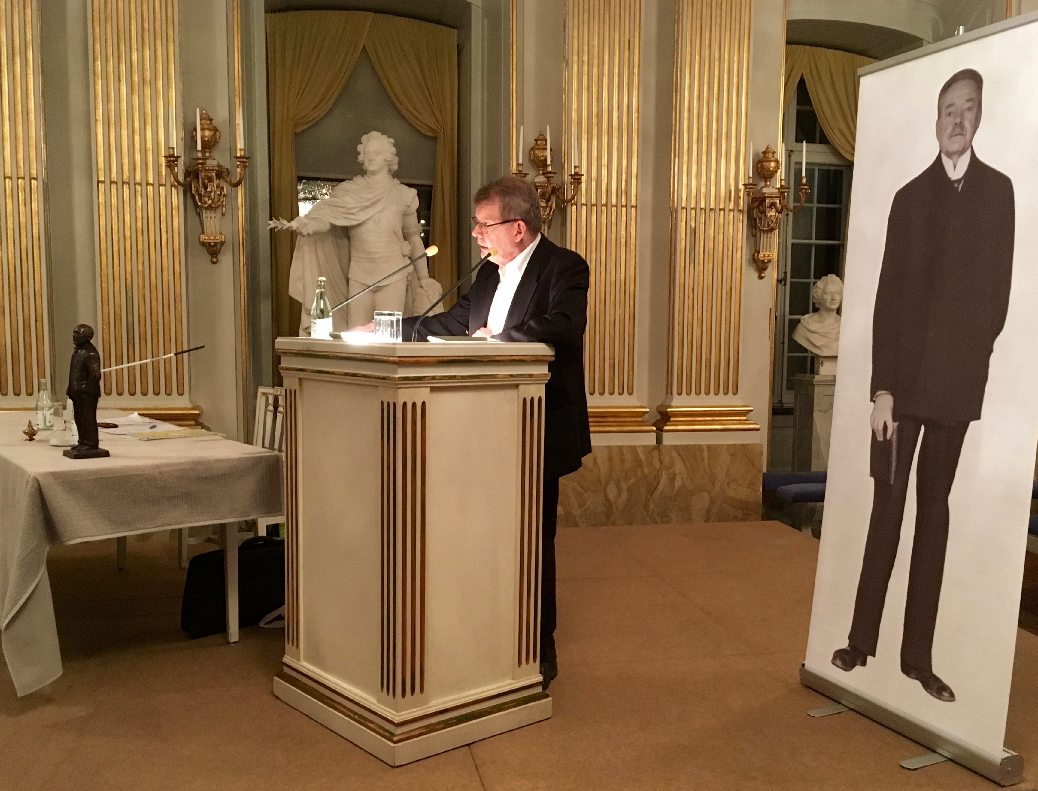 Lars Sjöstrand i Svenska Akademiens högtidssal med Söderbergsällskapet